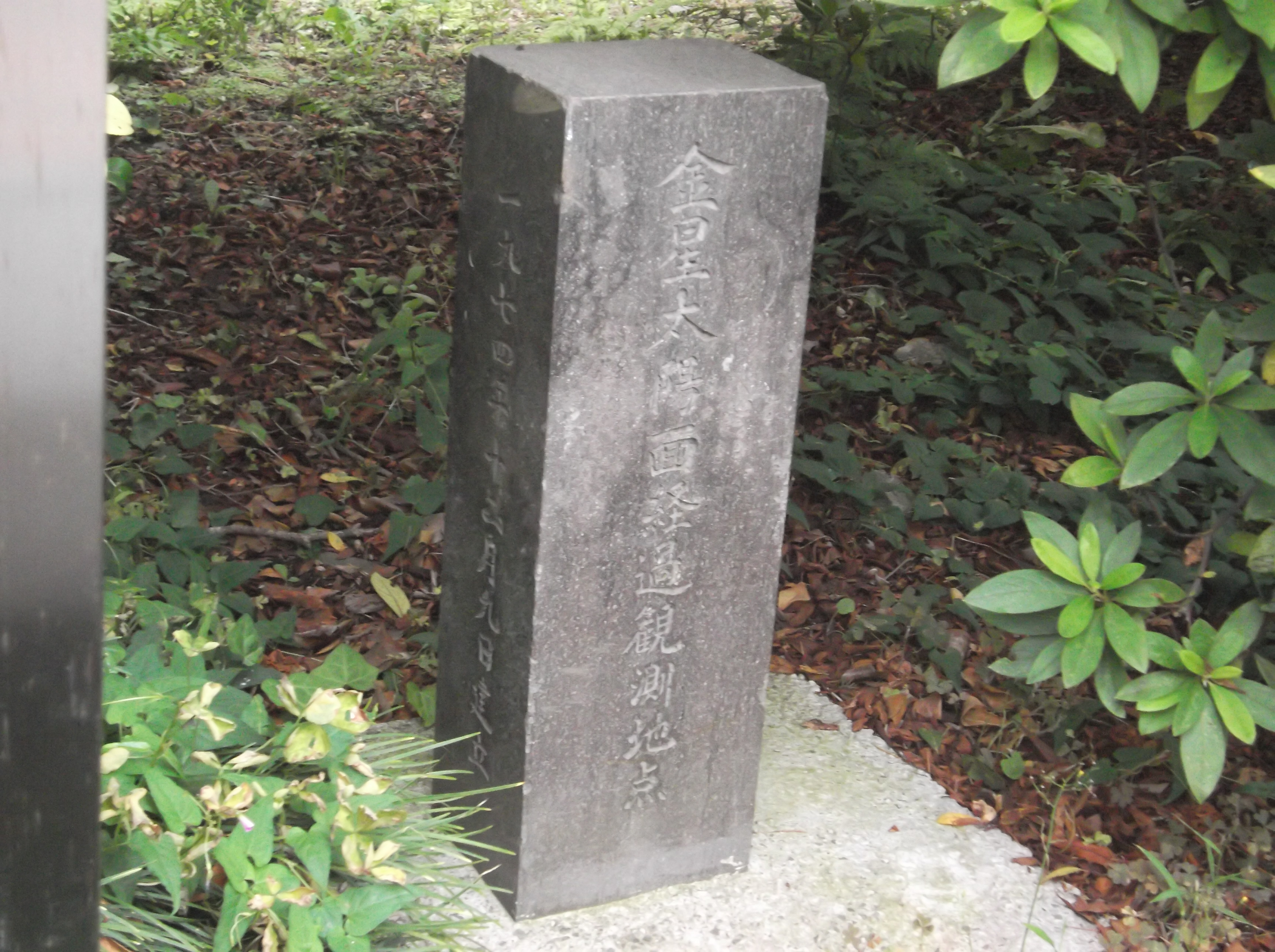 金星太陽面経過観測地点記念碑。神奈川県横浜市中区山手にある。1874年12月9日の観測から100年を記念して、1974年12月9日に建てられた。